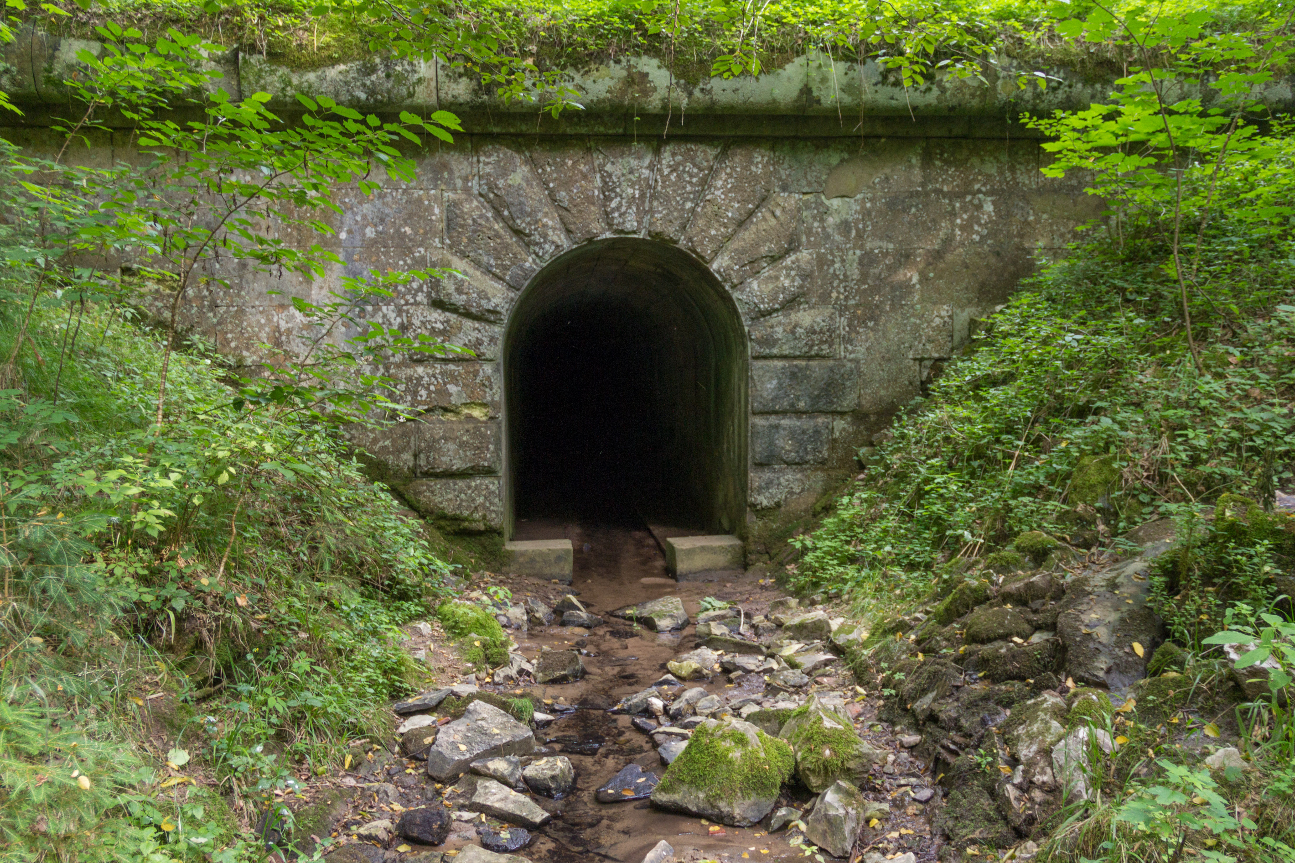 Ludwig-Donau-Main-Kanal, Schwarzenbach, Distellochdamm, Bachauslass, Nördlicher Damm